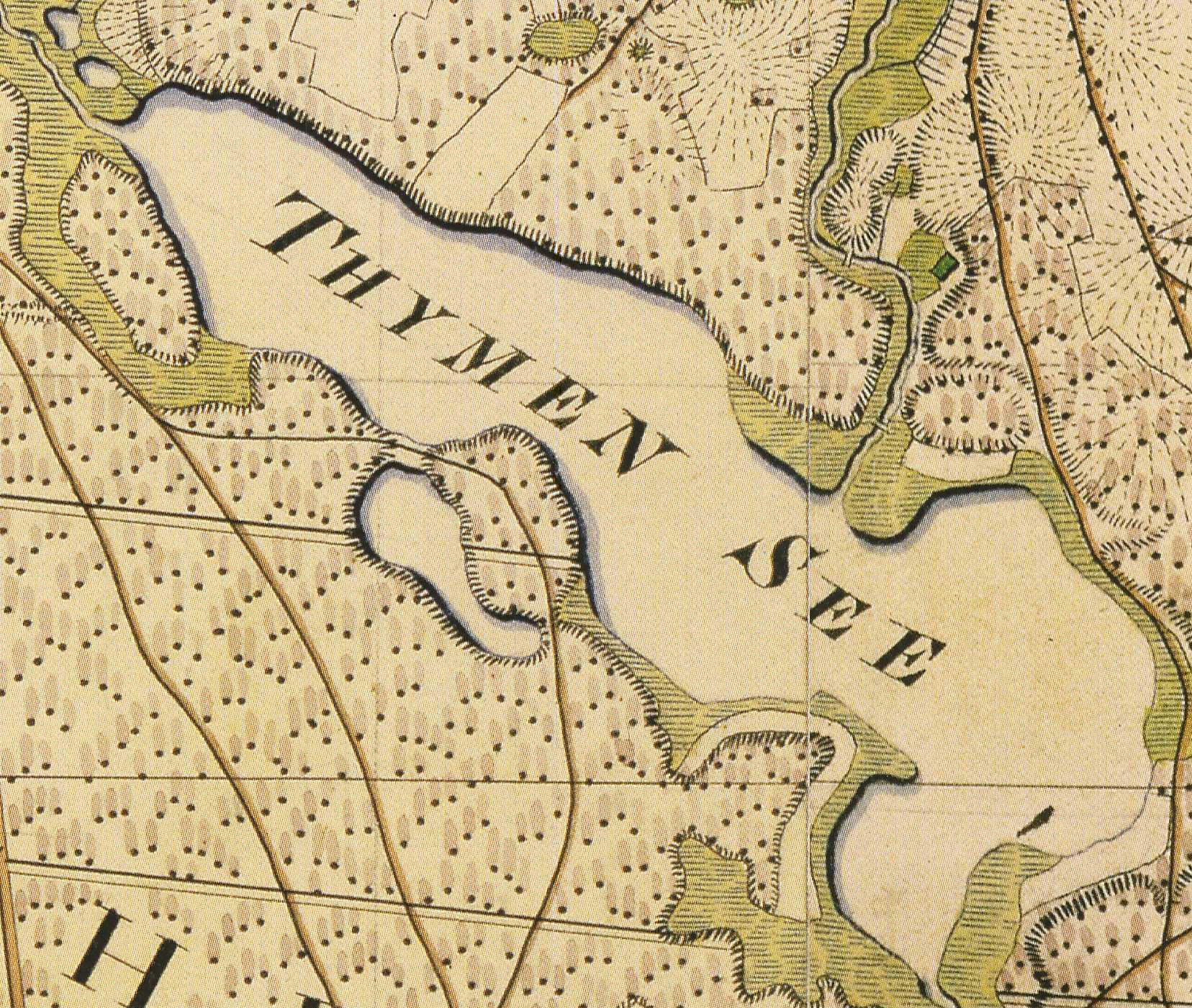 Thymensee im Landkreis Oberhavel, Brandenburg, Ausschnitte aus den Urmesstischblättern 2744 Wesenberg und 2745 Lychen kombiniert